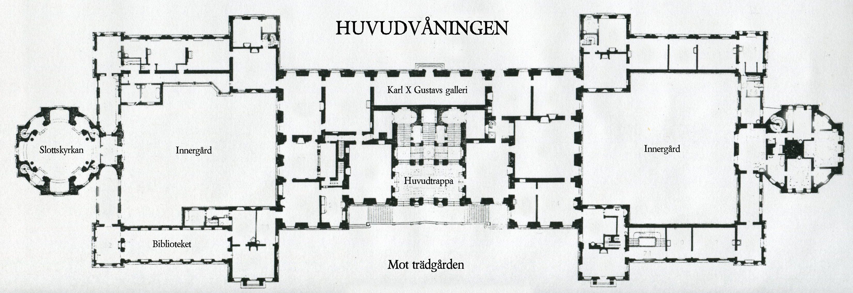 Drottningholms slott, planritning, huvudvåning